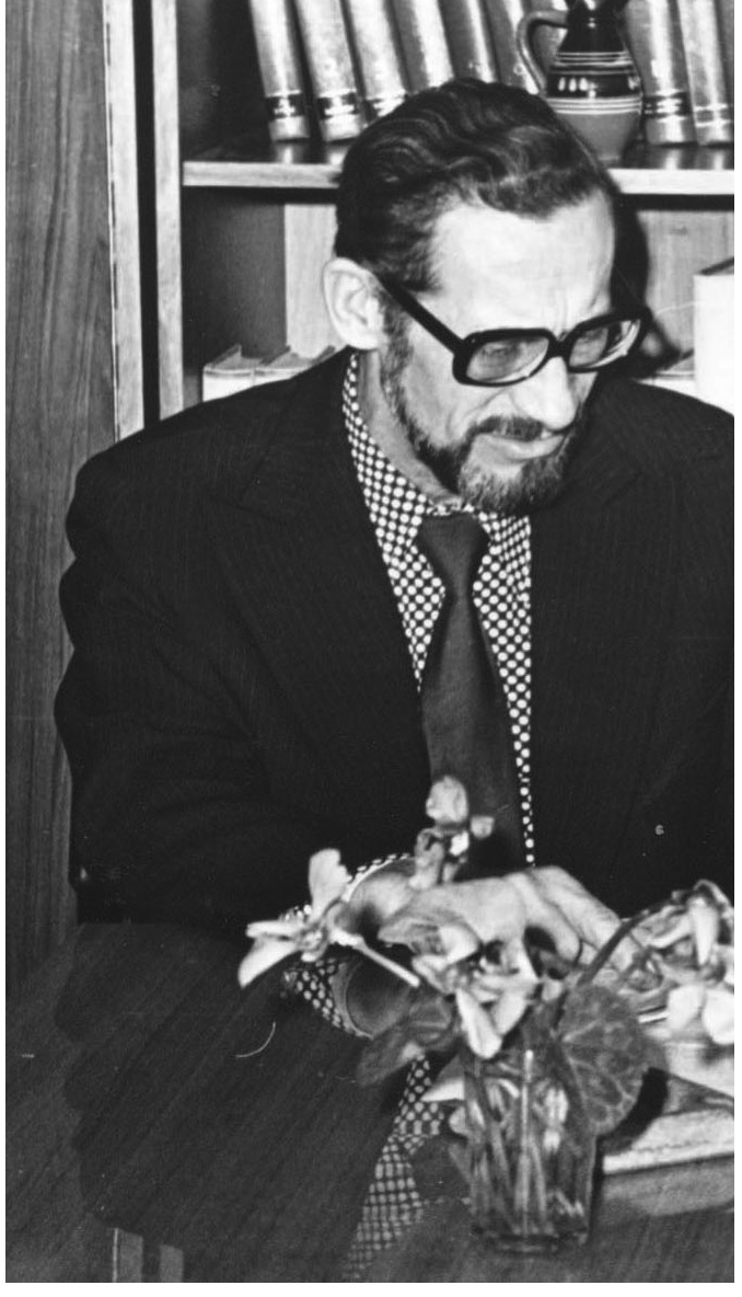 Harri Jänes Horisondi kolleegiumi koosolekul 1982. aastal.